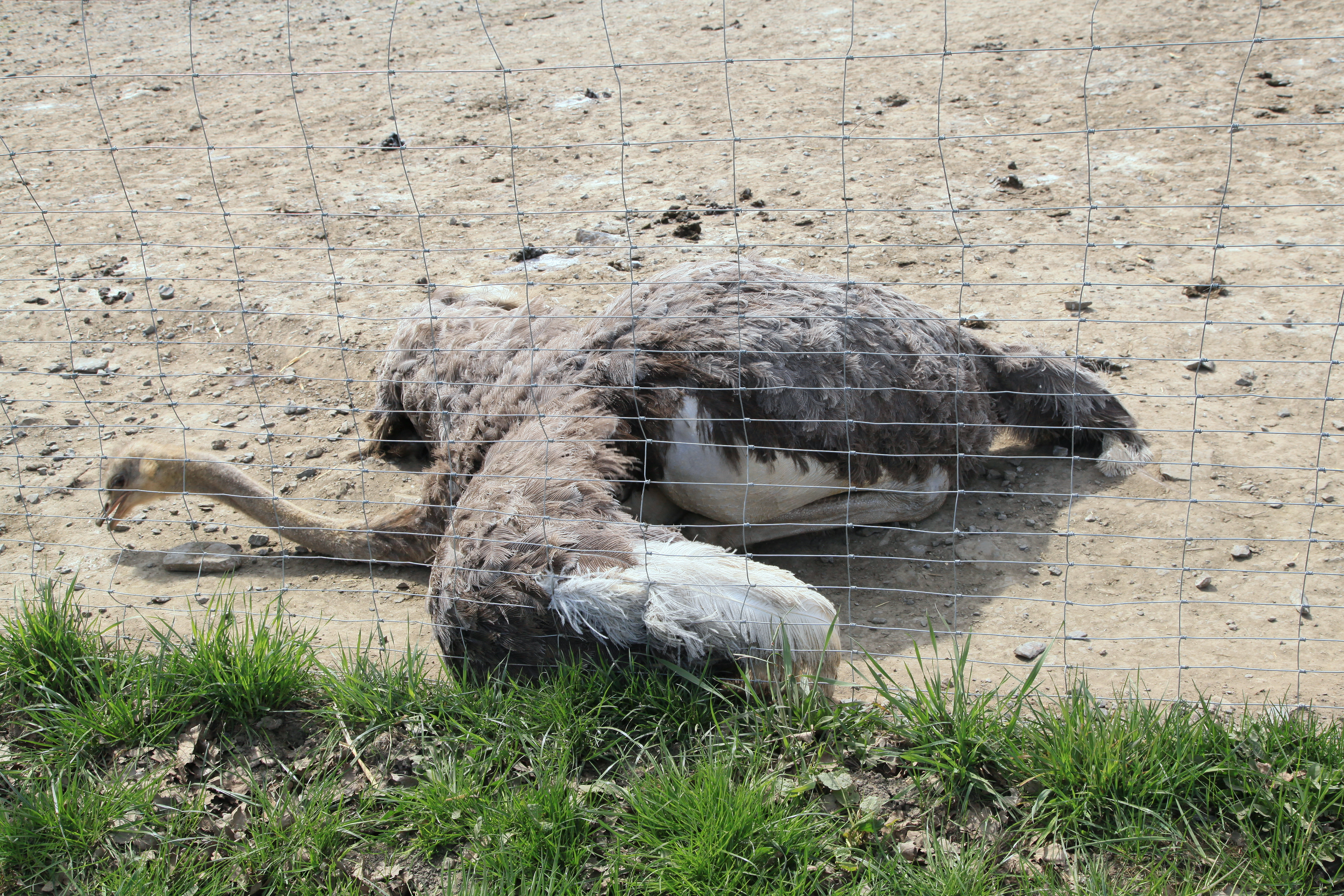 Straußenfarm Emminghausen, Emminghausen in Wermelskirchen